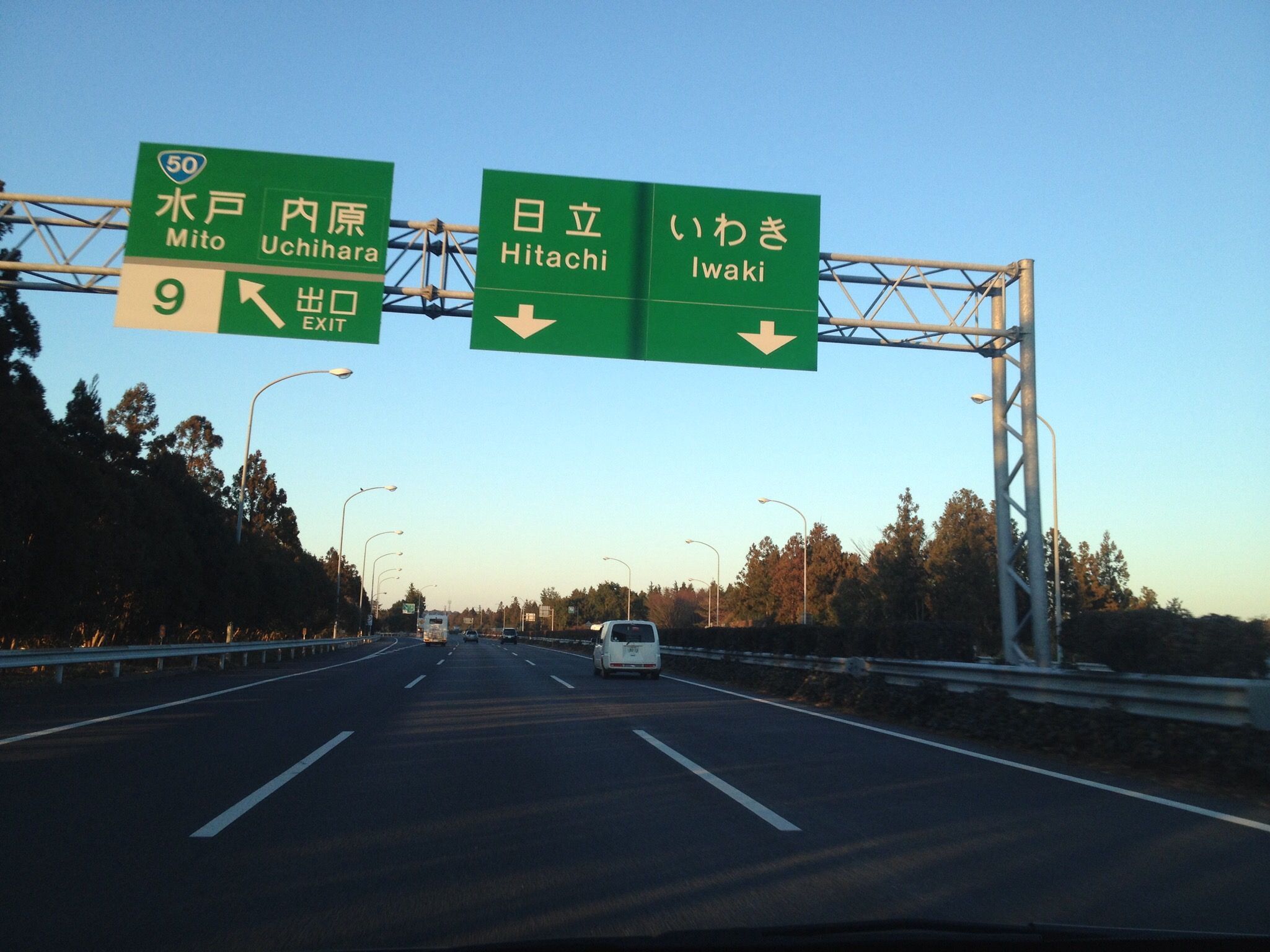 水戸ICの標識